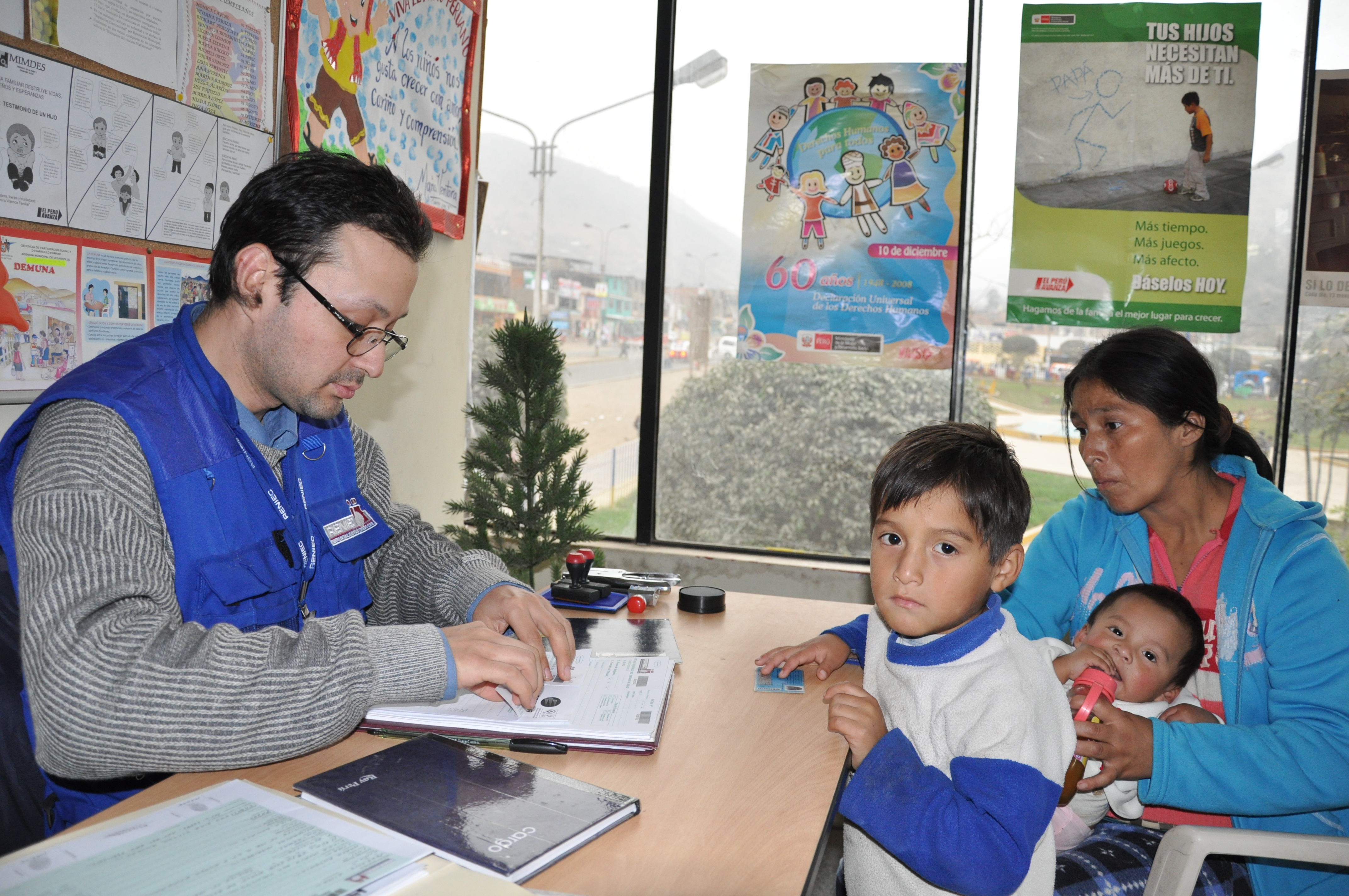 Campaña itinerante del Reniec en el distrito de Villa María del Triunfo